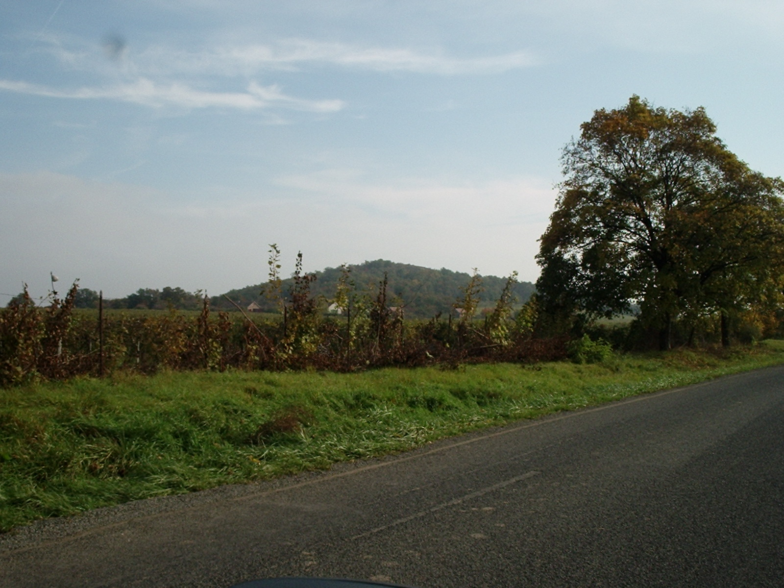 Harka, a Harkai-csúcs